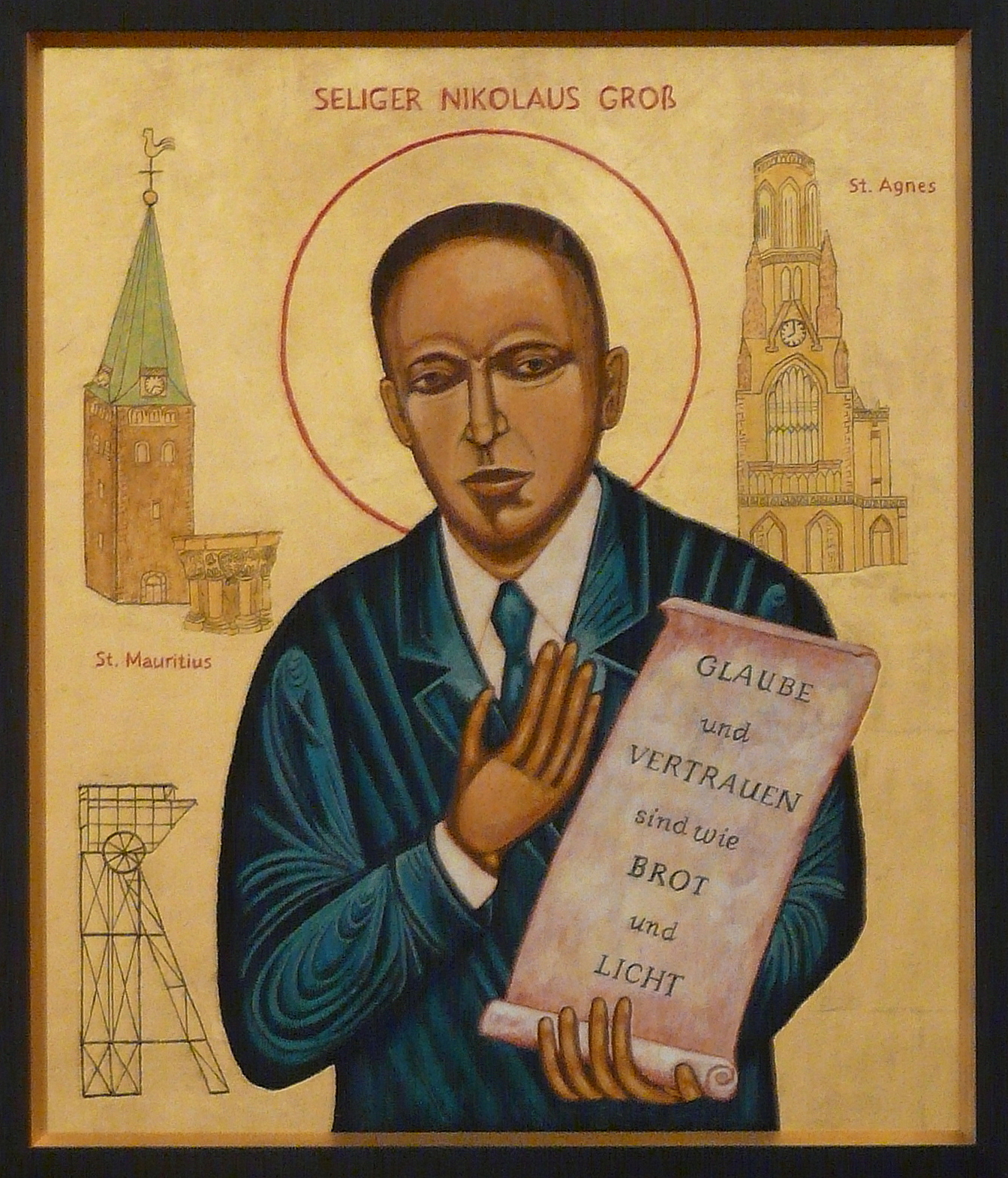 Nikolaus Groß, in Niederwenigern geboren, KAB Mitglied, Widerstandskämpfer, Gewerkschaftler ,Journalist